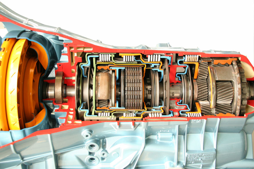 Das 6 HP 26 Automatikgetriebe der Zahnradfabrik Friedrichshafen (ZF). Technische Daten: 6 Vorwärtsgänge, 1 Rückwärtsgang 89 kg mit Öl Leistungsbereich bis 320 kW bei 5800/min Der Getriebeeingang (Motorseite) ist links am Wandler (gelb) Bilddaten: Autor: Benutzer:Ralf Pfeifer Erstellt: 26.07.2006 Ort: Deutsches Museum München